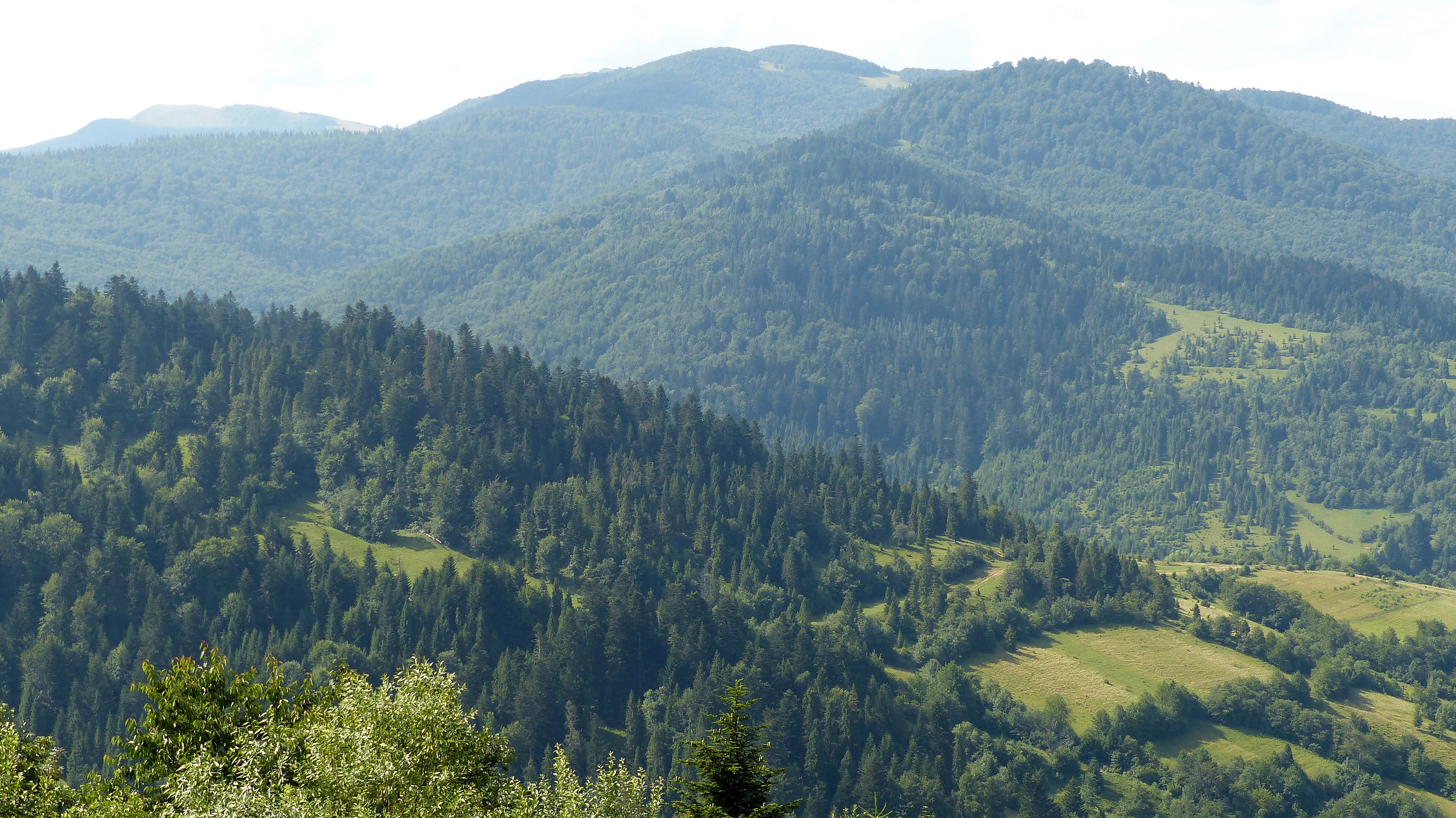 Ужанський НПП, Великоберезнянський р-н